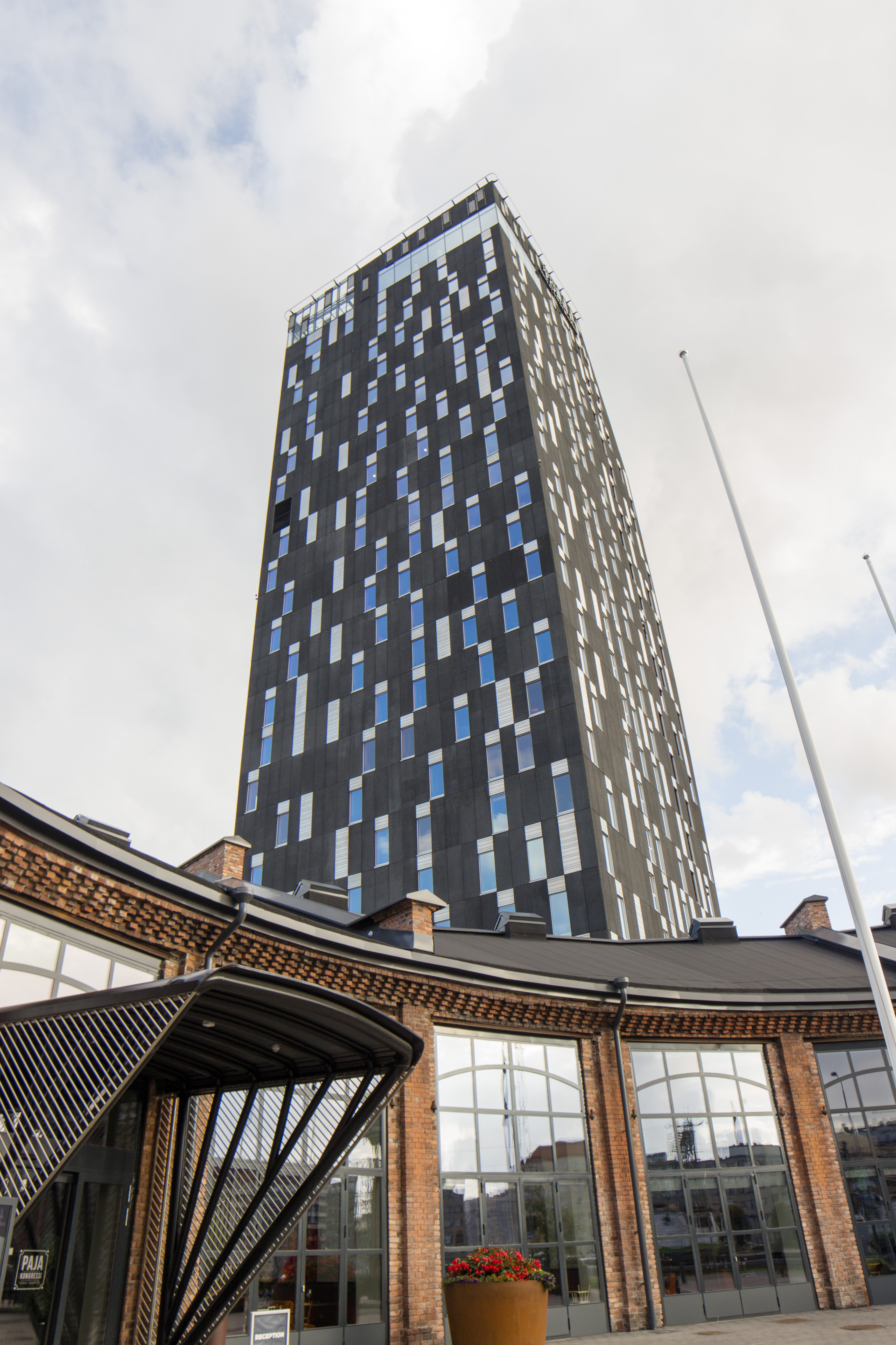 Tampereella sijaitsevaa Torni-hotellia koristaa Lammin Ikkunat. Torni-hotelli valmistui vuonna 2014.